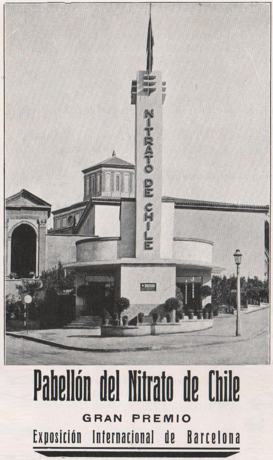 Pabellón de Nitrato de Chile para la Exposición Internacional, folleto publicitario de 1929.